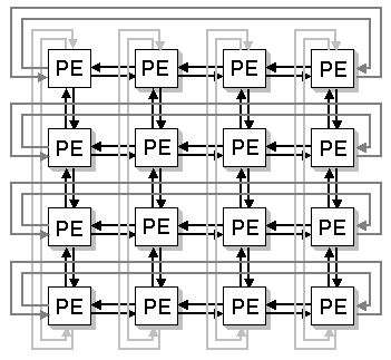 Топология MasPar